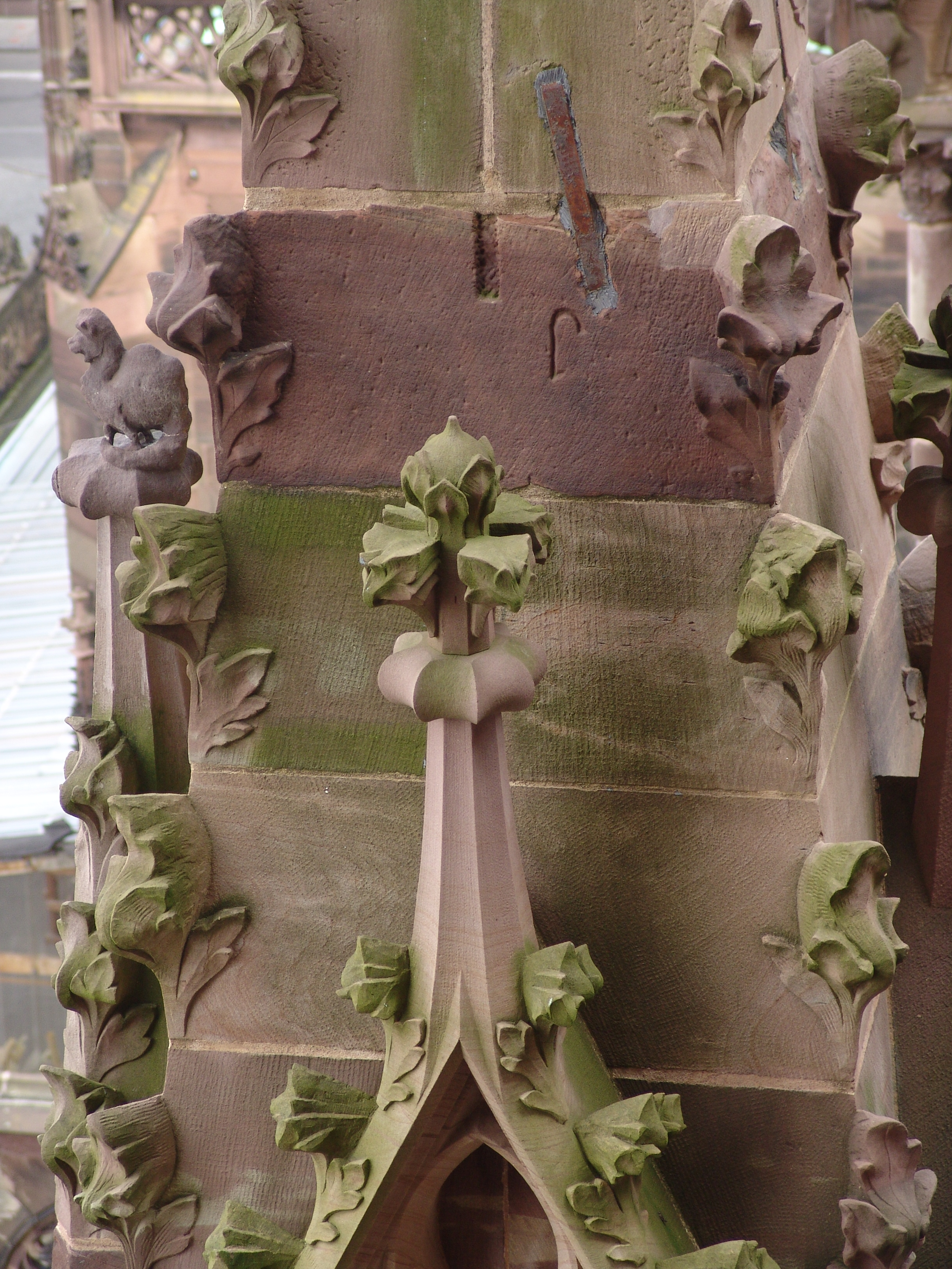 Cathédrale Notre-Damecathédrale